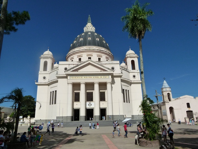 Basílica de Nuestra Señora de Itatí. Localidad de Itatí